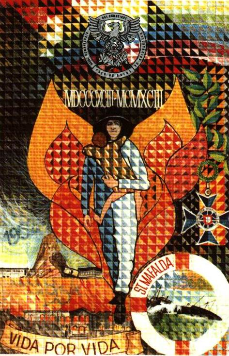 AHBVPA-Azulejo Centenário